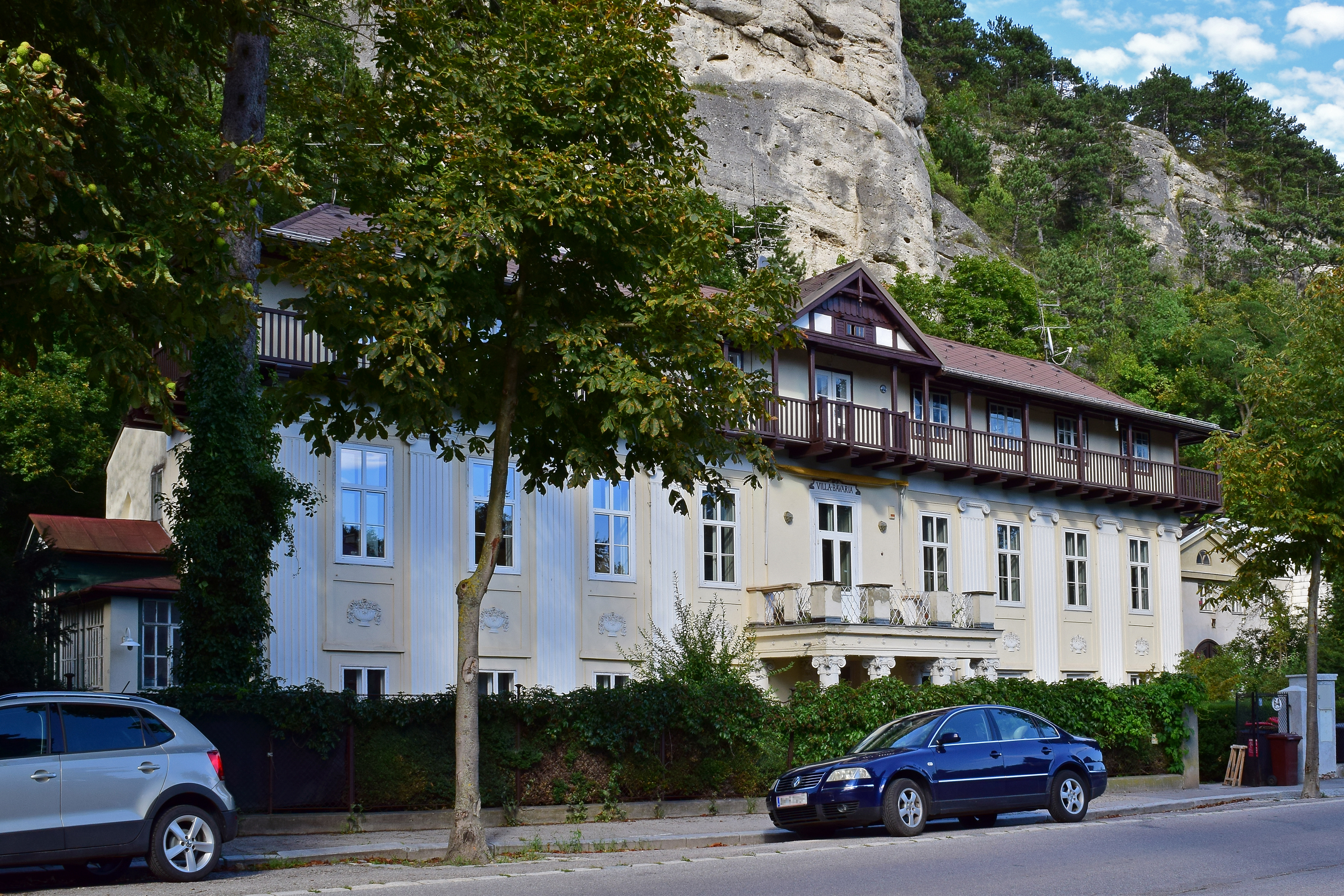 Schönfeldvilla